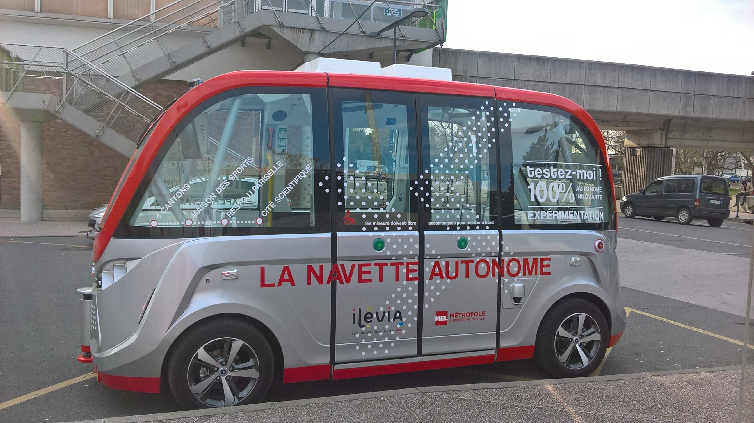 Navette autonome Navya stationnée à l'arrêt de bus à côté de la station de métro Quatre Cantons - Stade Pierre Mauroy à Villeneuve-d'Ascq.